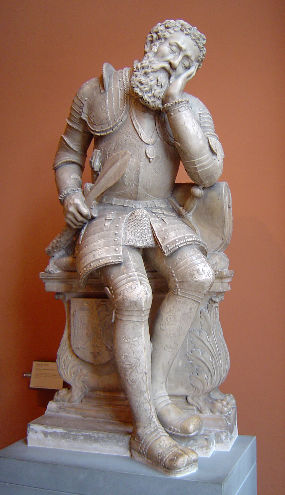 Par contrat du 24 juin 1557, Bontemps s'engagea envers la sœur du défunt, Martienne de Maigny, à exécuter le tombeau de ce capitaine des gardes de la Porte du Roi, représenté endormi dans sa fonction.